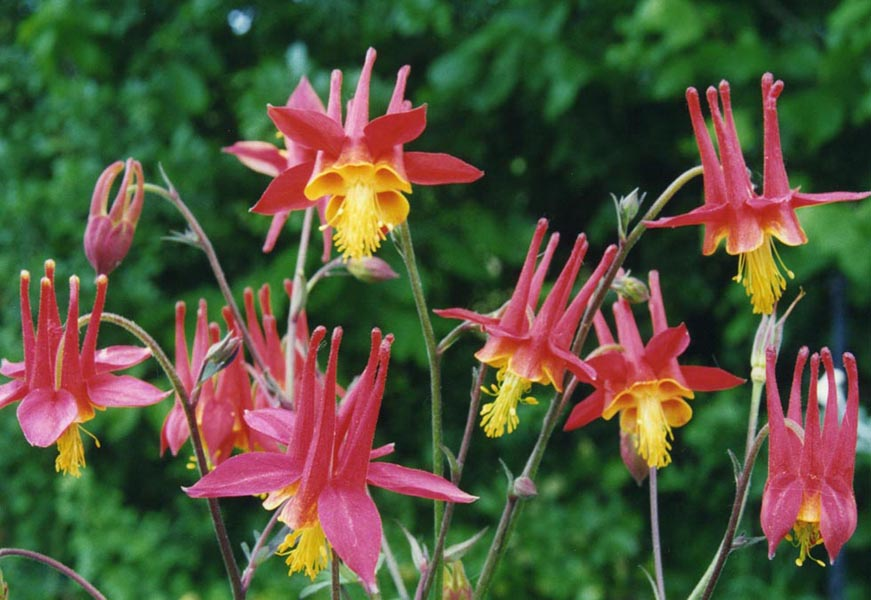 Aquilegia skinneri